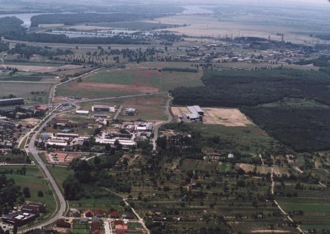 Paks, Hungary, aerialphotography